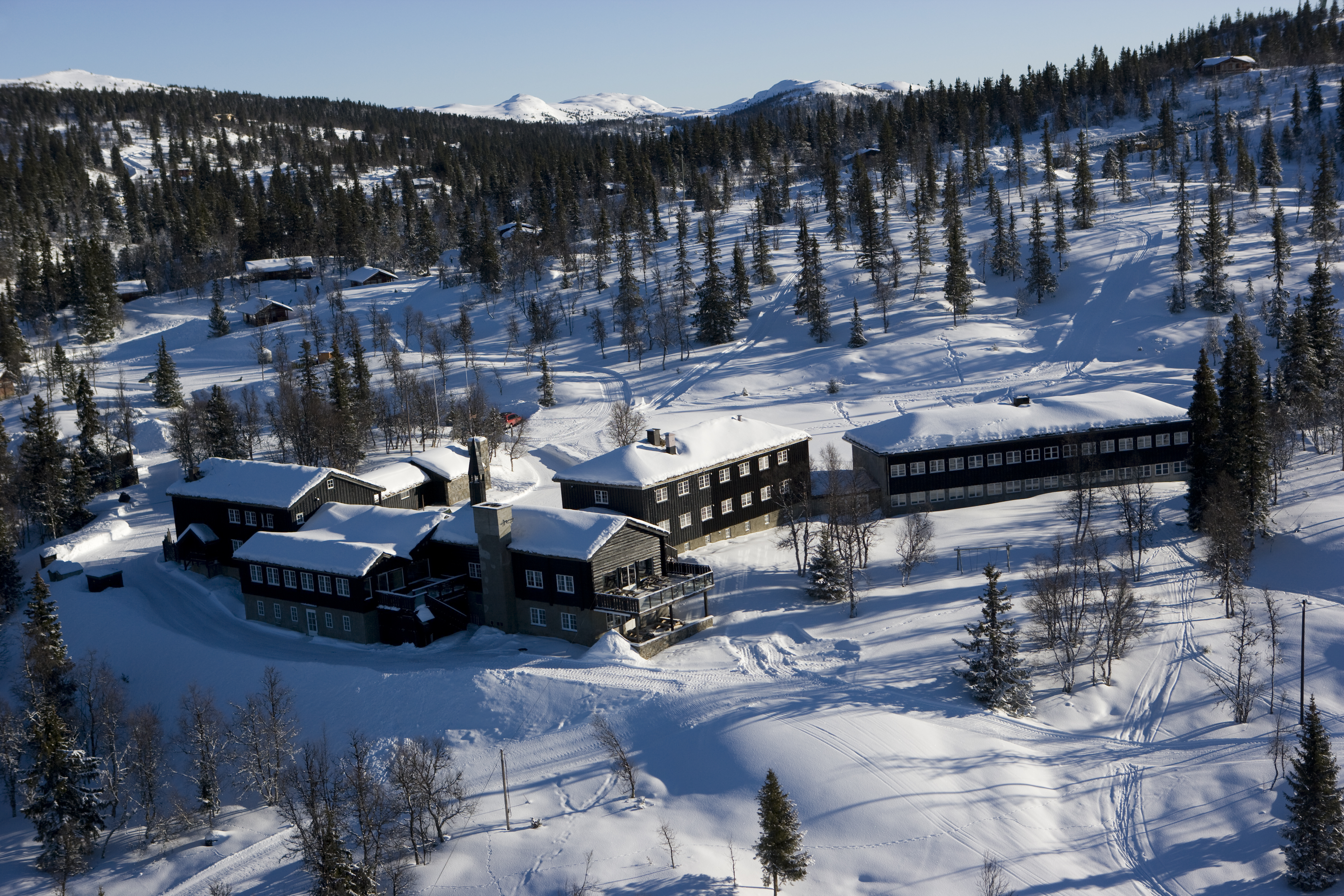 danebu